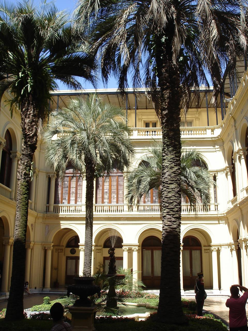 The Palm Tree Patio, Casa Rosada. Buenos Aires, Argentina.